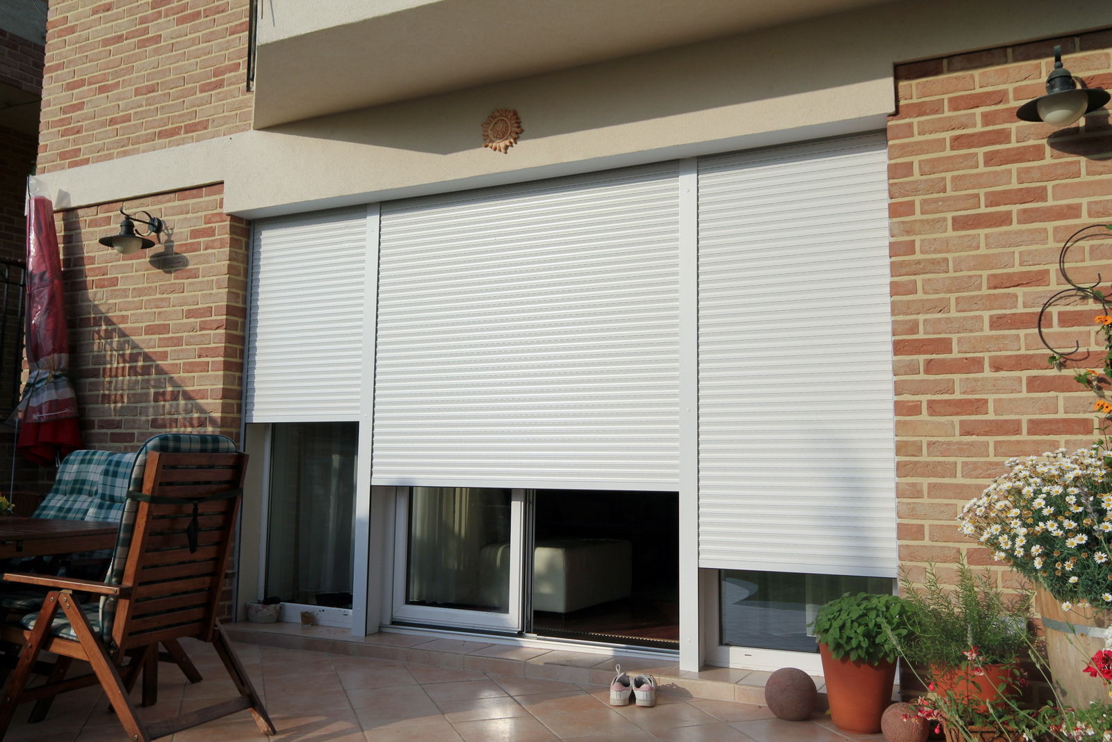 Bílé předokenní hliníkové rolety ve schránce pod omítku.